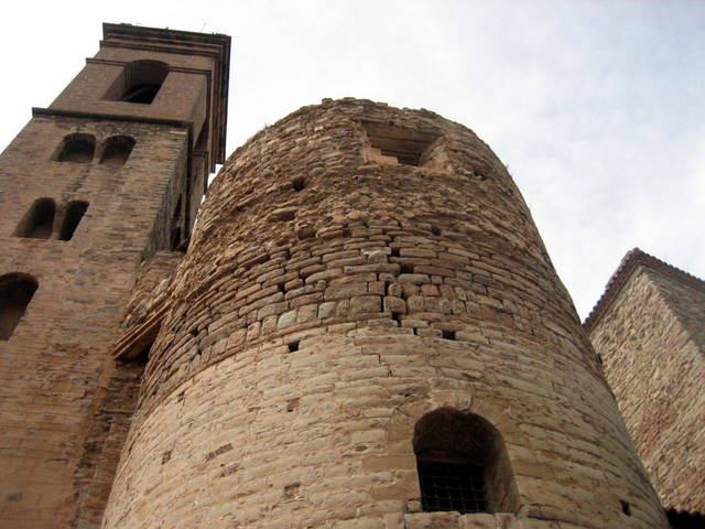 Castell de Súria a la comarca del Bages - Catalunya